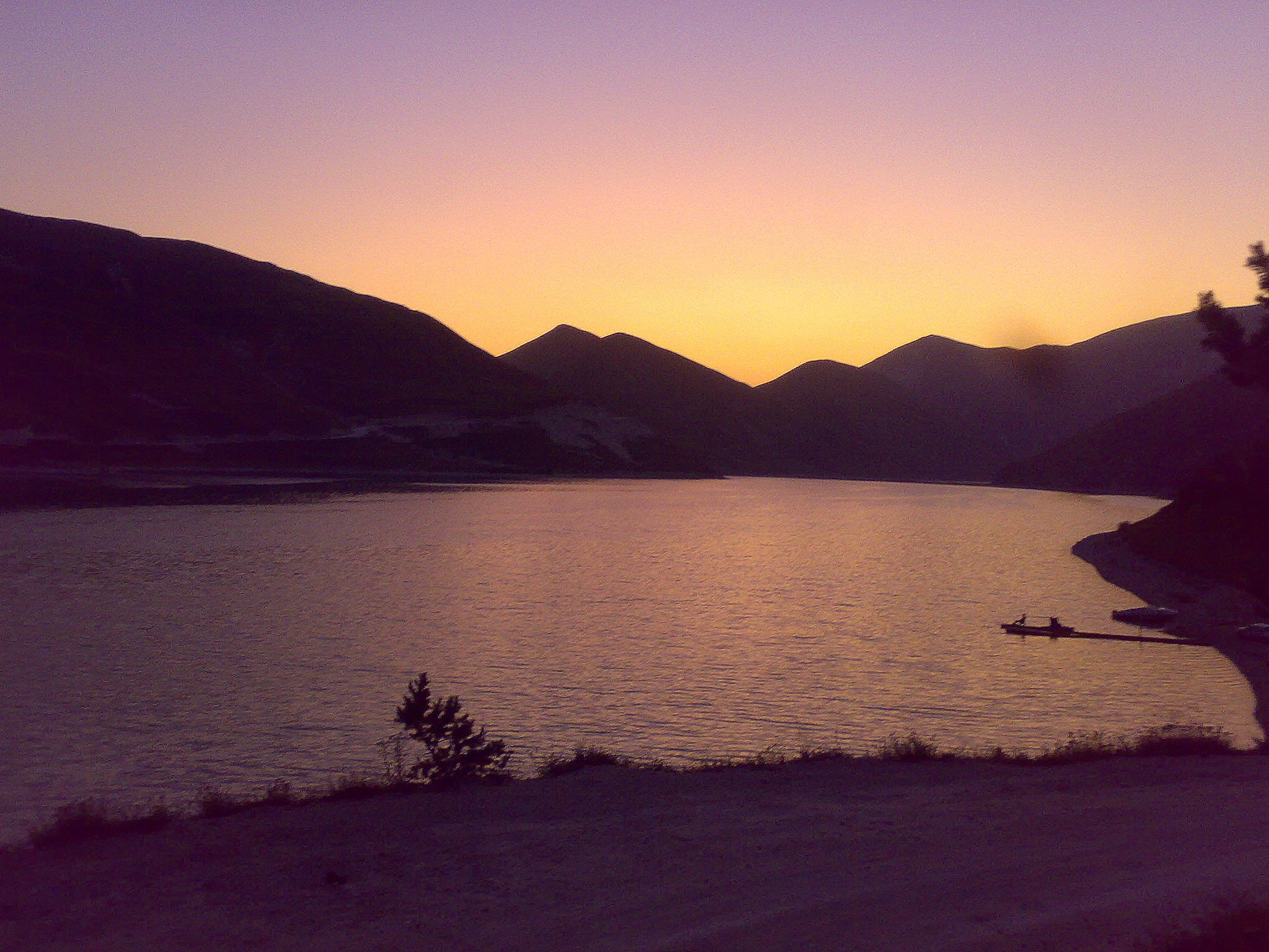 Озеро Кезеной-Ам (Эйзенам), Веденский район This image is related to the protected area of Russia number 2010008